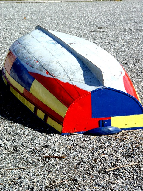 Чамец во Струга